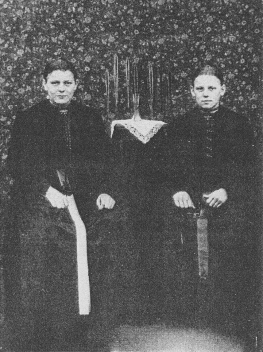 Sonntagskleider aus Schönwald bei Gleiwitz